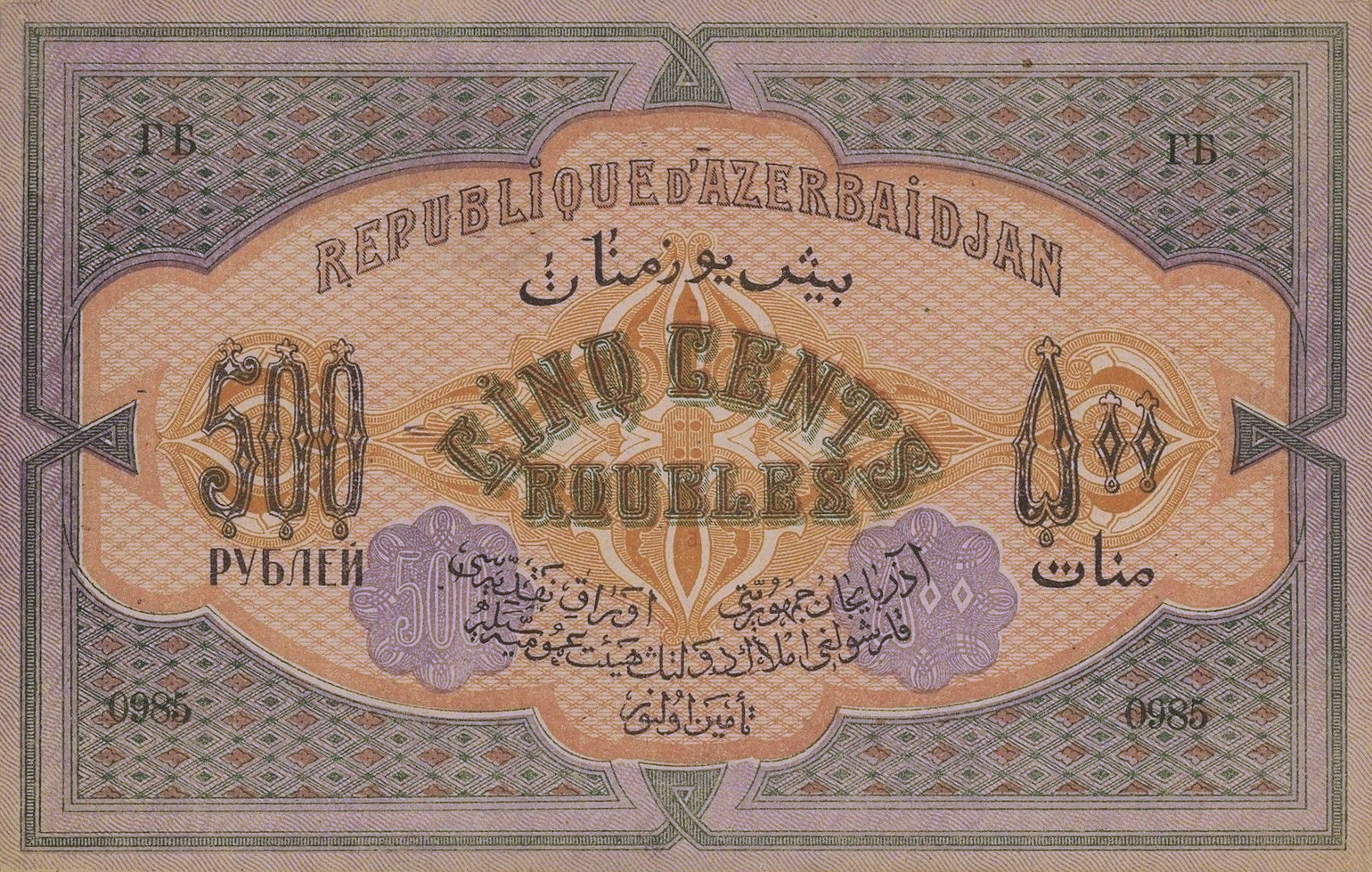 عملة ورقية أذربيجانيَّة من فئة 500 منات صدرت سنة 1920م